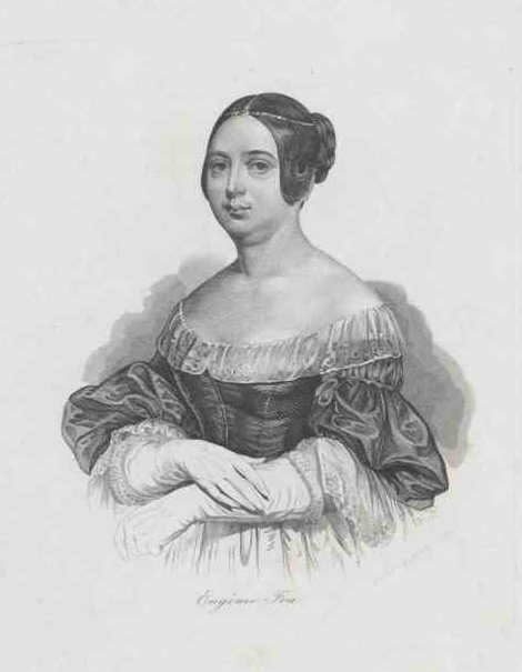 Eugénie Foa (1796-1852), born Rodrigues-Henriques